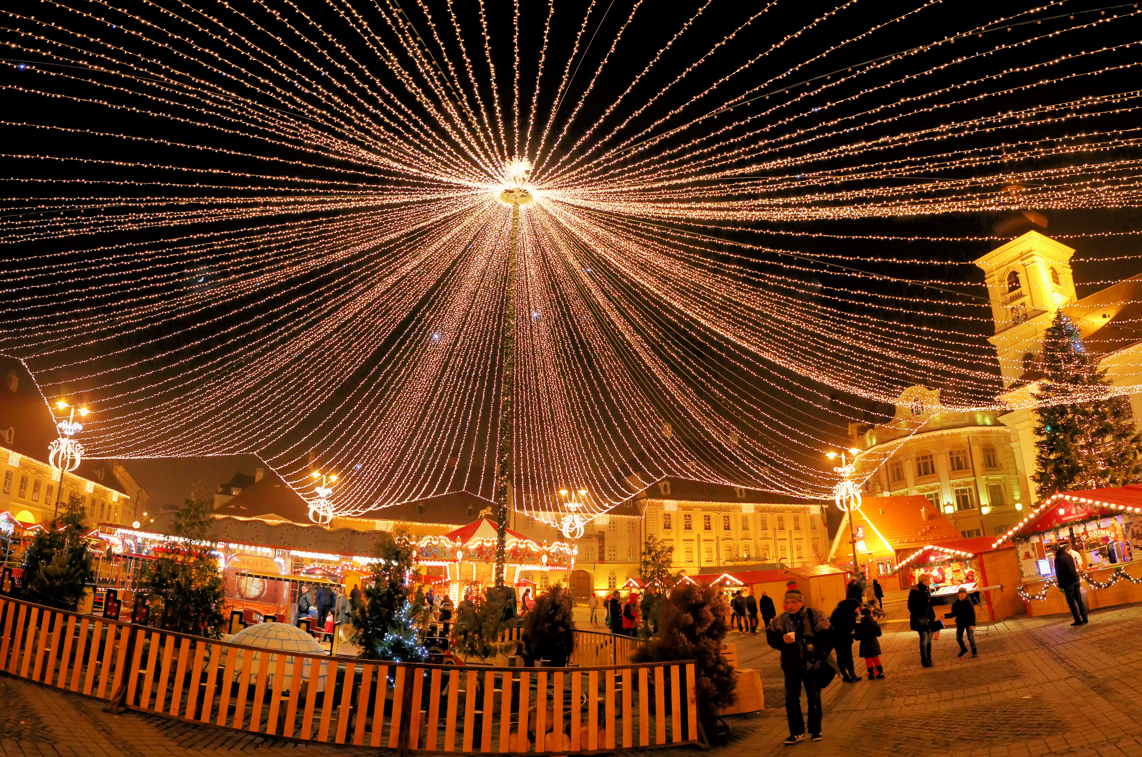 Ansamblul fortificațiilor orașului medieval